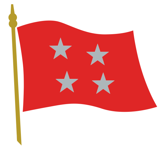 Bandera del Comandante en Jefe del Ejército de Chile.